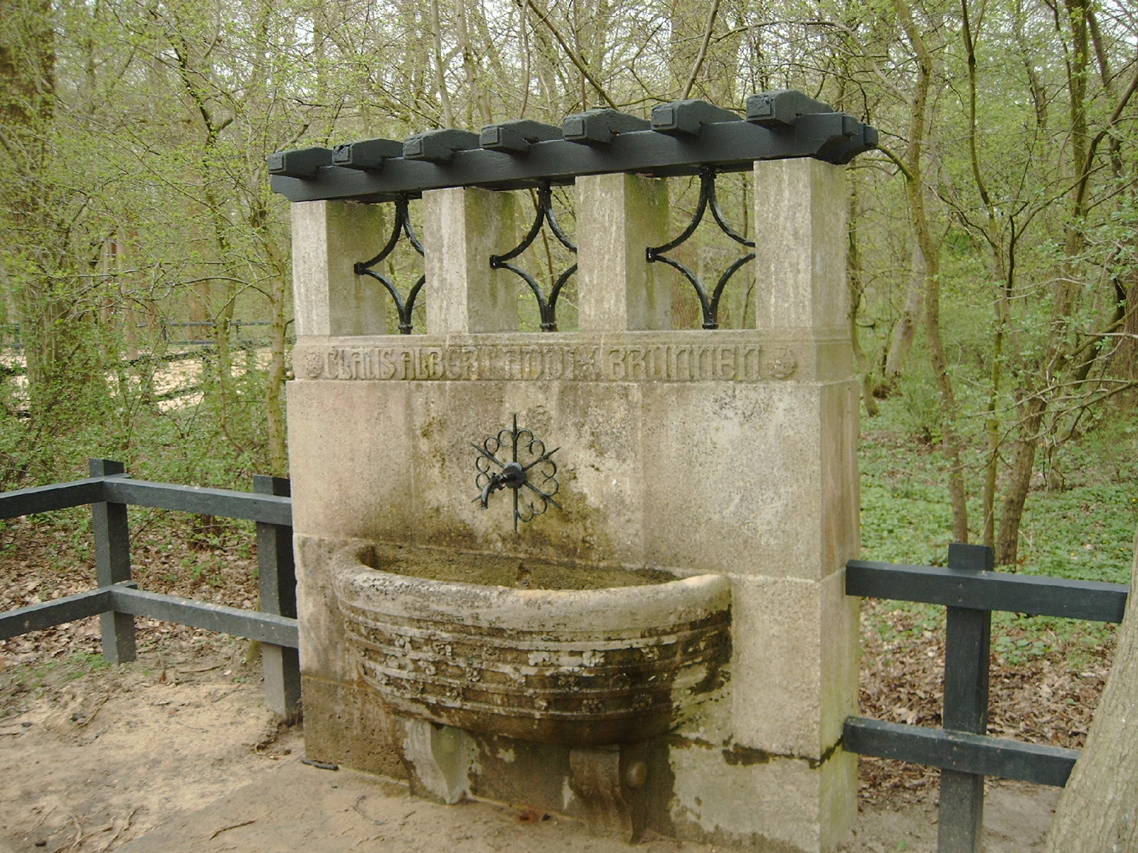 Claus-Addix-Brunnen 1908 Das abgebildete Objekt ist ein geschütztes Kulturdenkmal in der Freien Hansestadt Bremen, mit der Nr. 0218,T033 beim Landesamt für Denkmalpflege registriert.